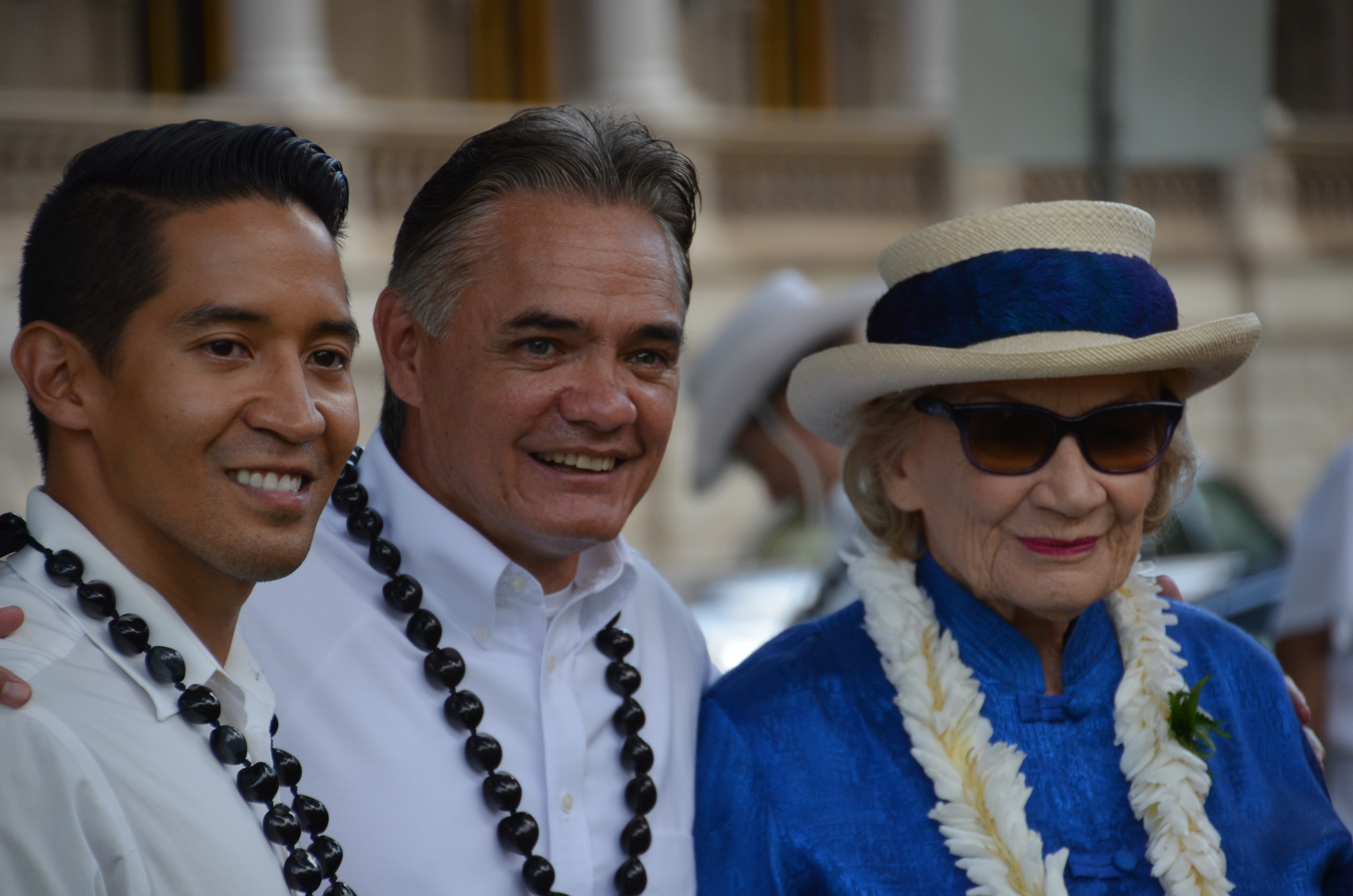 Royal Hawaiian Band Concert: N.N., Bandmaster Clarke Bright, Abigail Kinoiki Kekaulike Kawānanakoa (a0002559)